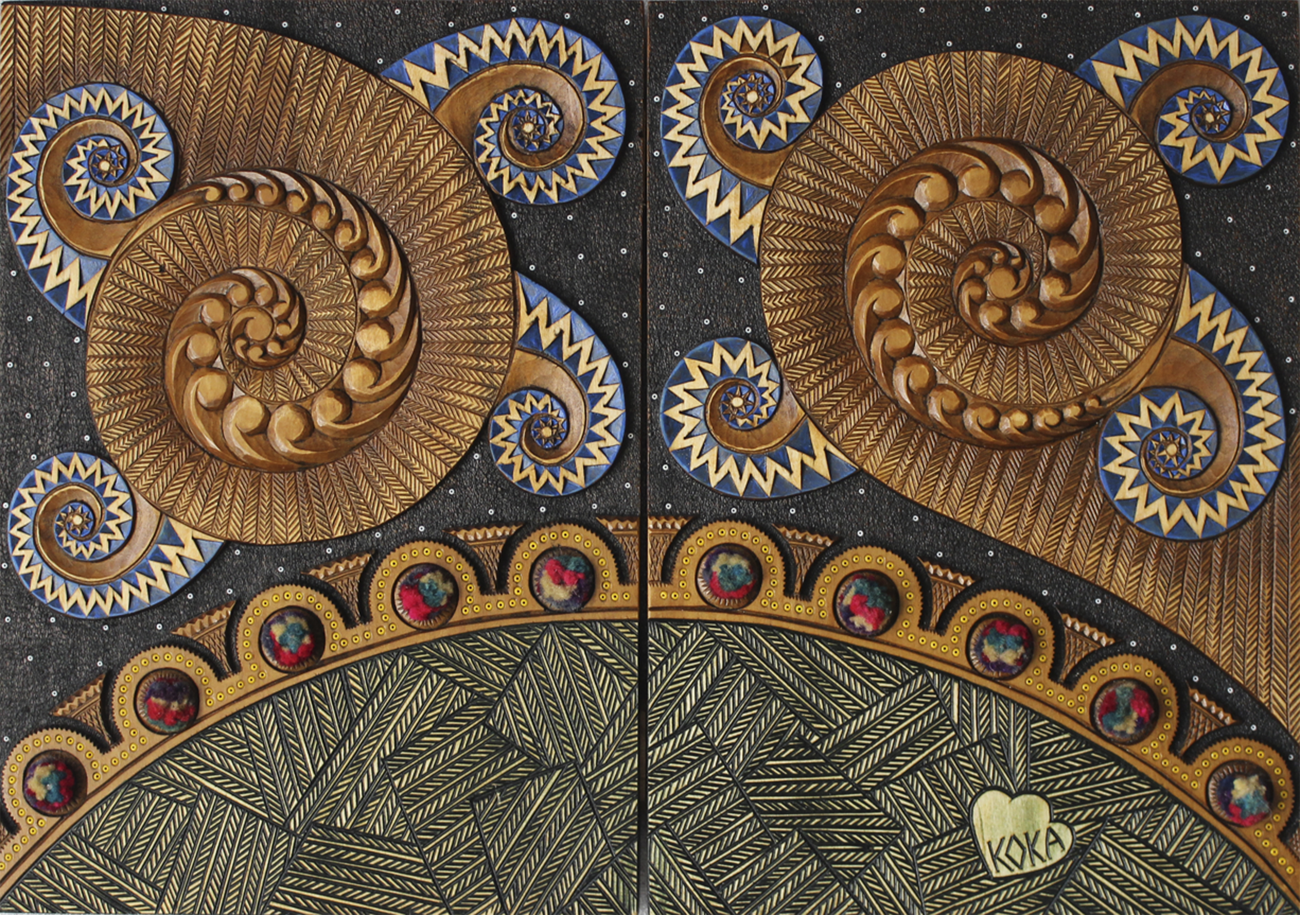 Plast